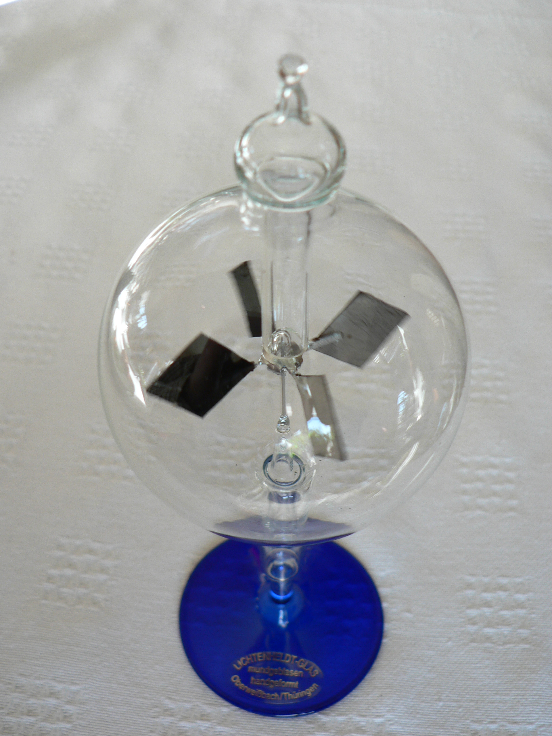 Radiometer Crookes - Oberweißbach-Thüringen